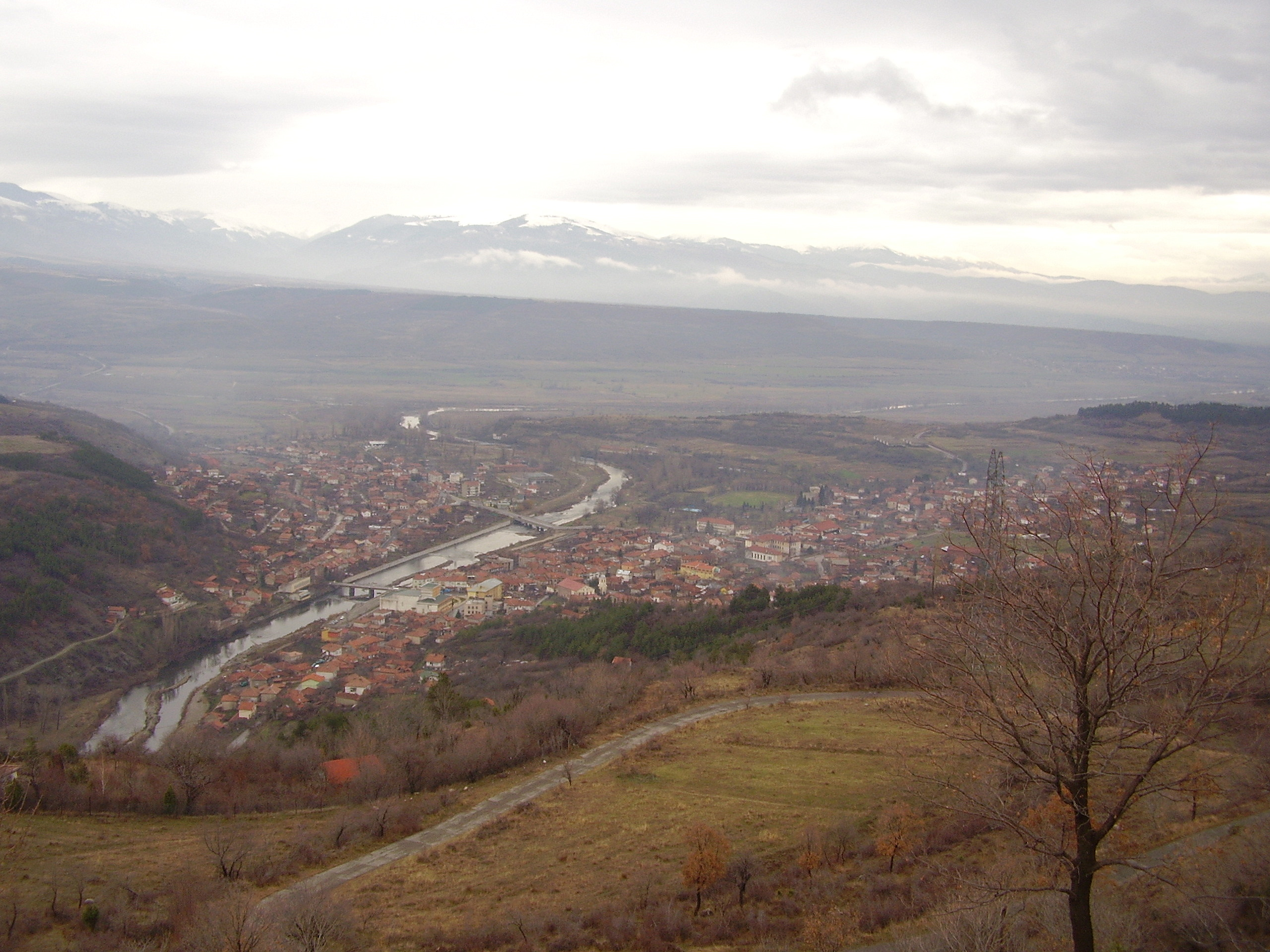 Гл.Бобошево